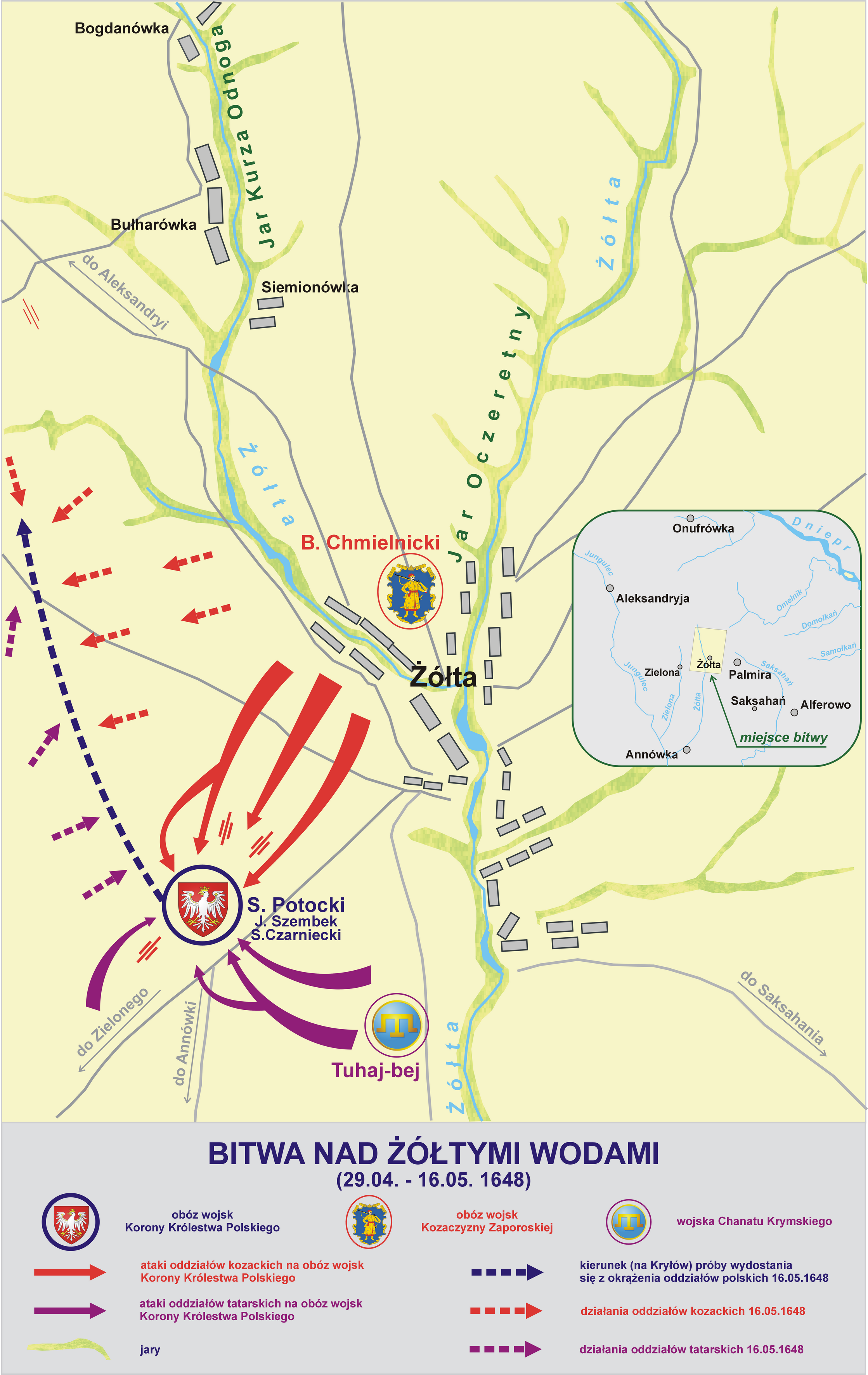 Bitwa nad Żółtymi Wodami (29.04. - 16.05.1648)